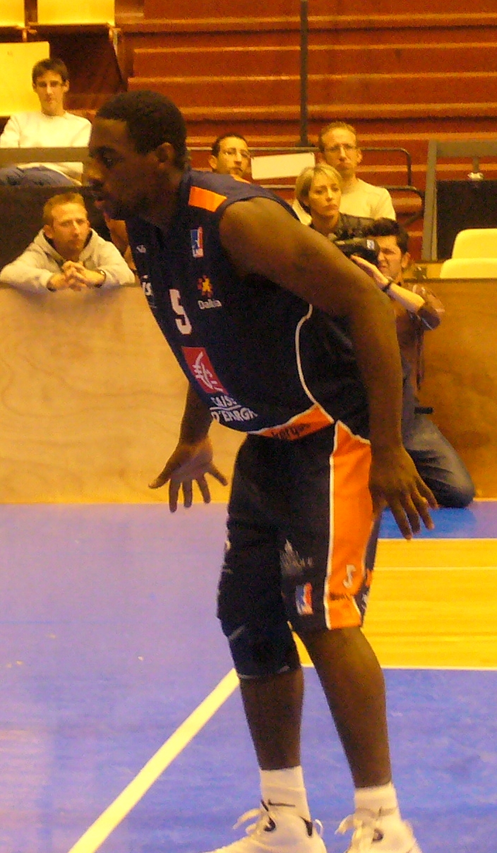 Le joueur français de basket-ball Paccelis Morlende (BCM Gravelines, à Clermont-Ferrand)